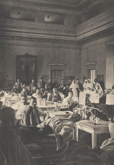 Госпиталь Всероссийского Земского союза в большом зале Русского Географического общества.